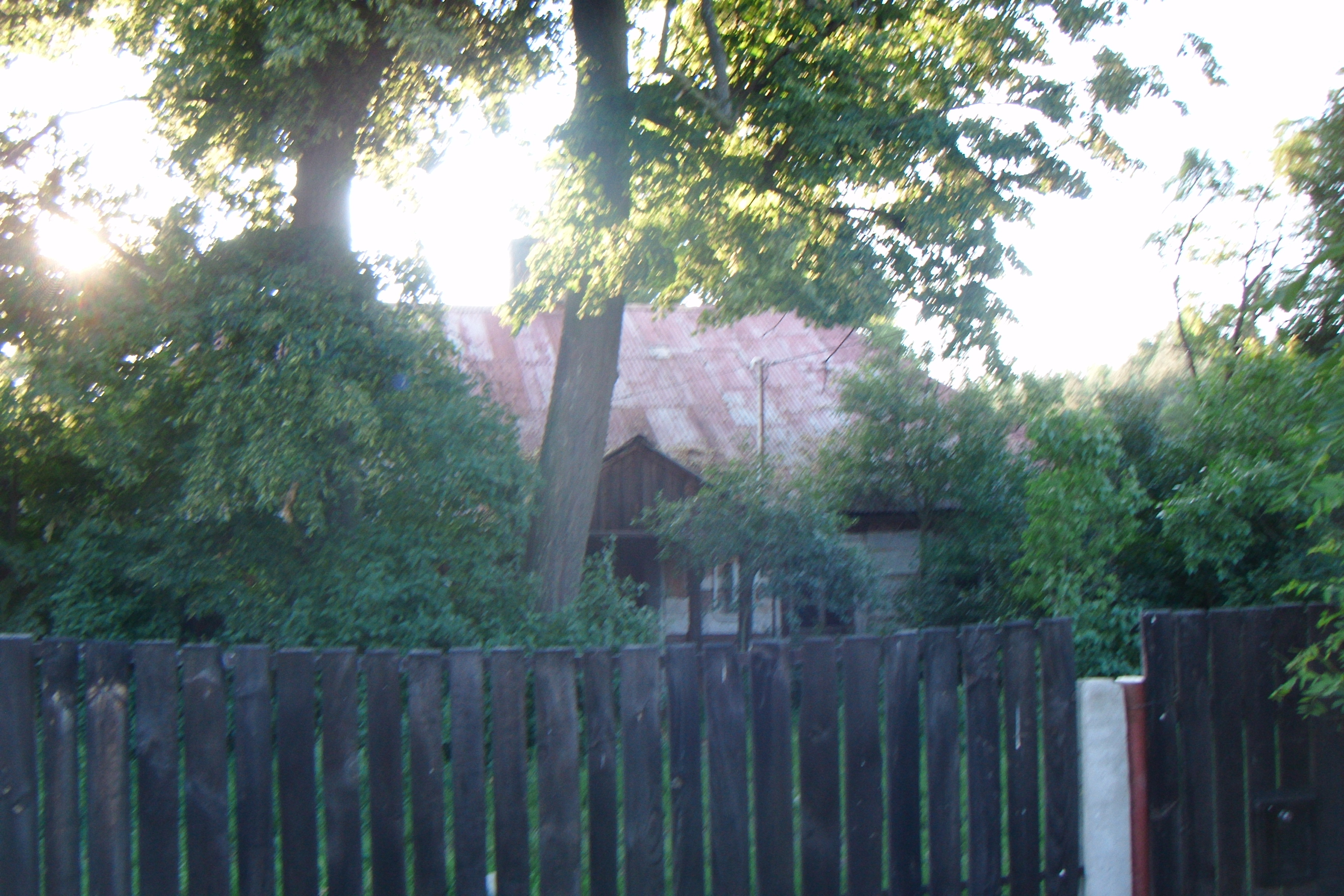 Dom zawiadowcy fryszerek na południe za ogrodzeniem huty "Józef"